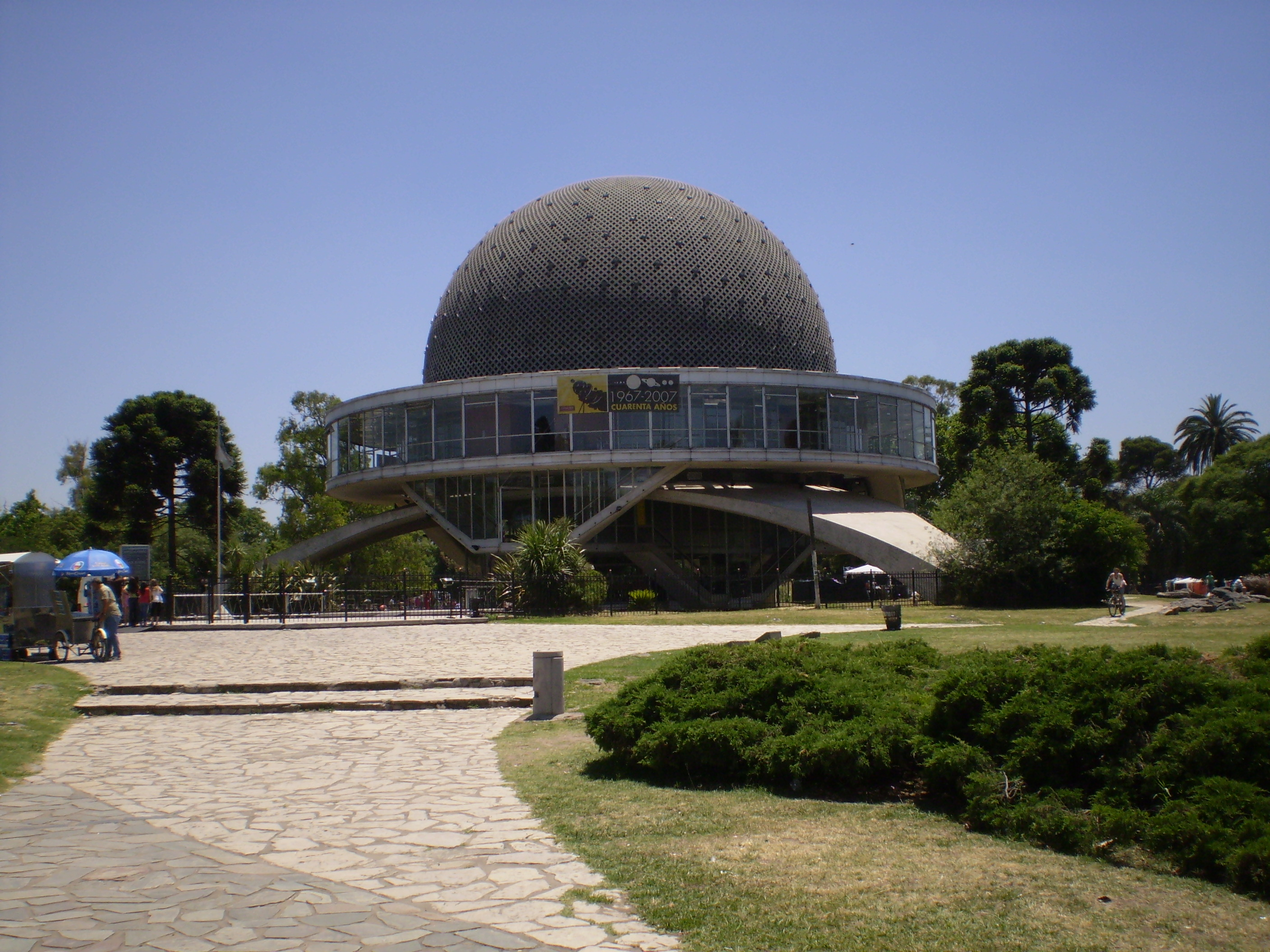 Planetario de la ciudad de Buenos Aires, Argentina